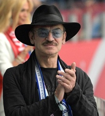 Михаил Боярский на первом матче Кубка конфедераций 2017 года